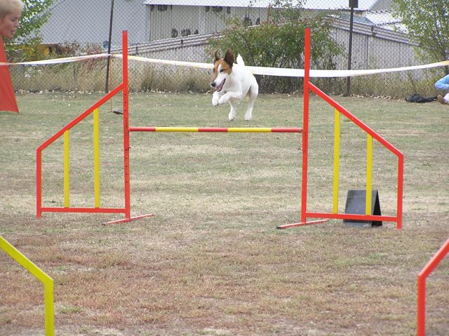 Jump photo by Martina Vakoničová 2005